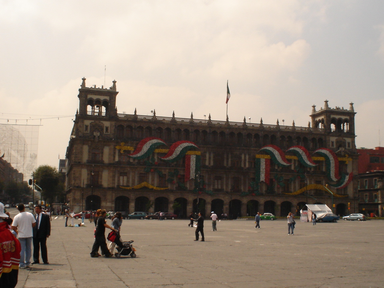 Departamento del Distrito Federal DEPARTAMENTO DEL DISTRITO FEDERAL.